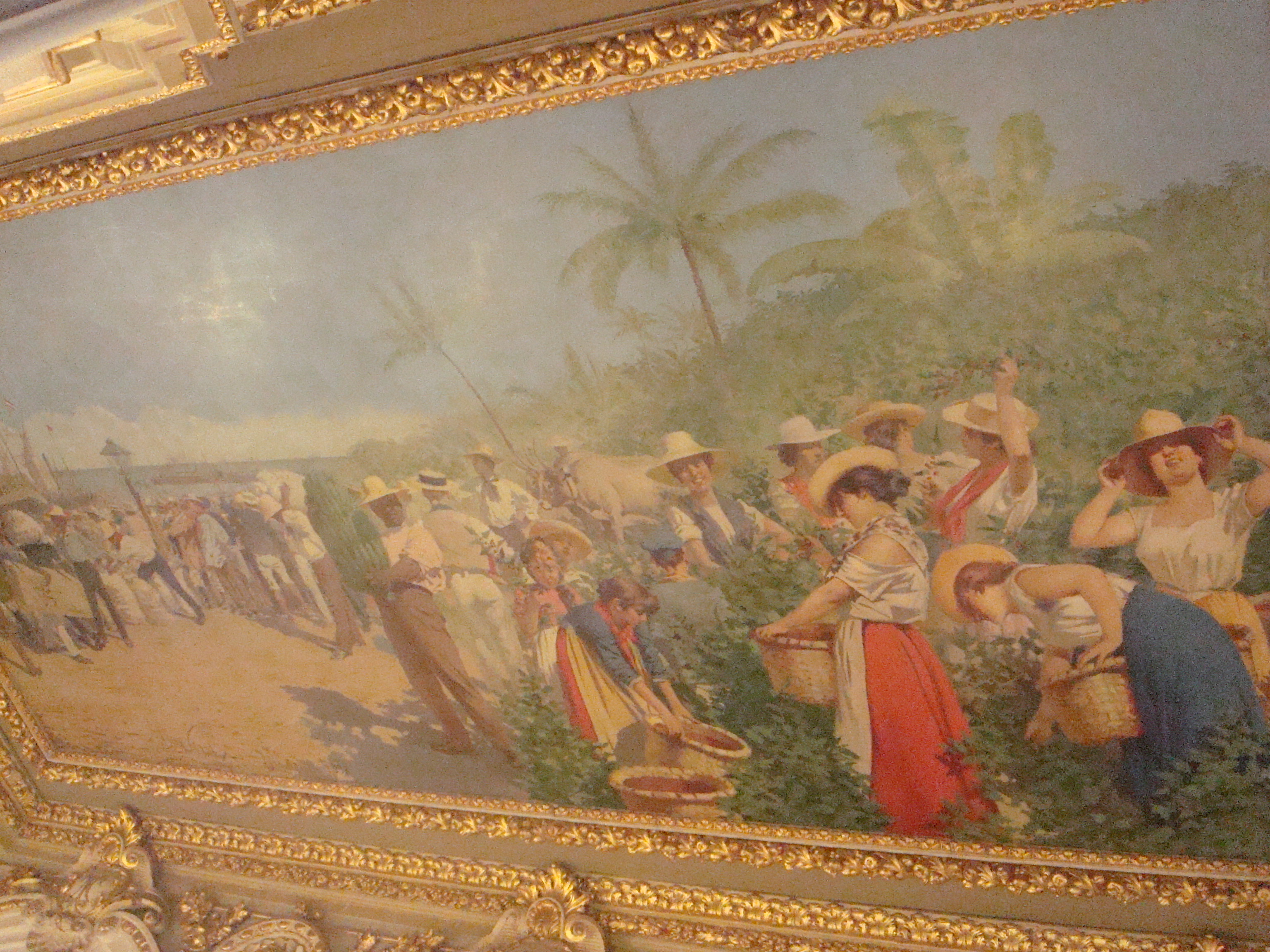 Mural "Alegoría al café y al banano" (1897), del italiano Aleardo Villa (1865-1906), pintado en el pecho del Teatro Nacional de Costa Rica.